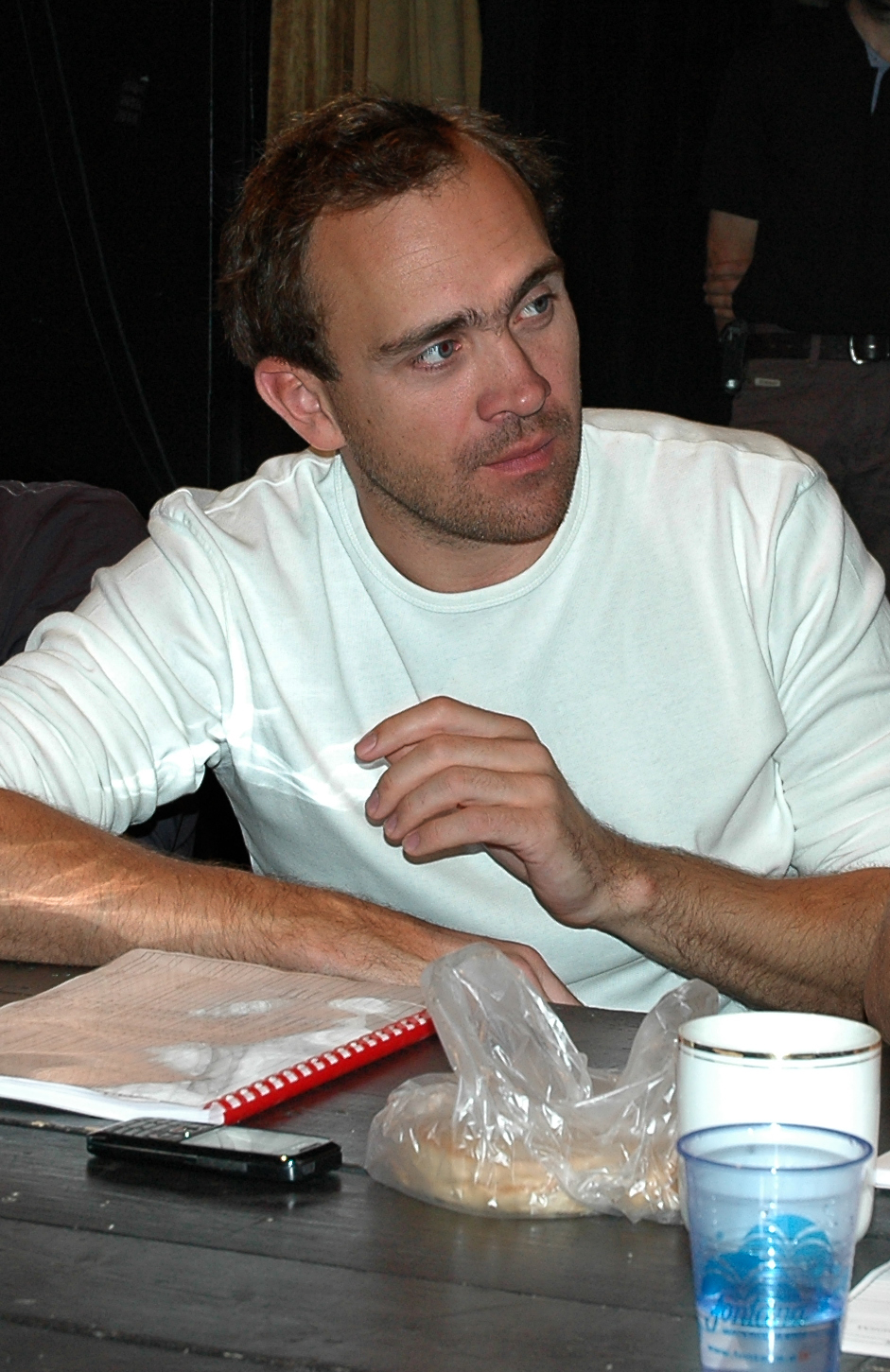 První čtená zkouška (Astrolog, Divadlo Rokoko)